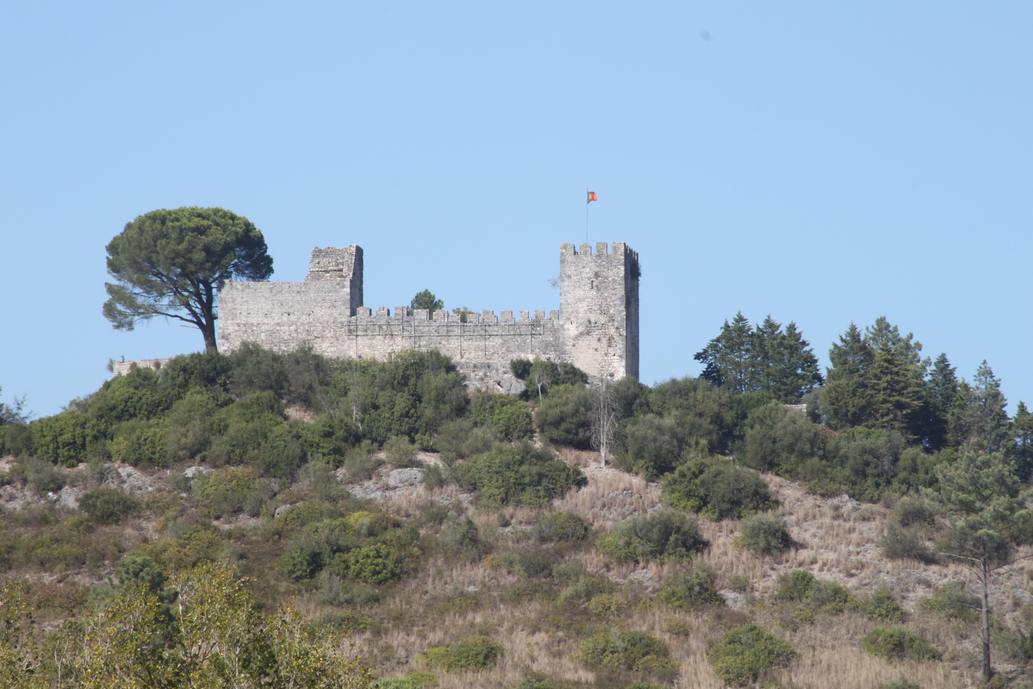 Castelo de Alcanede (ruínas) This file was uploaded for Wiki Loves Monuments in Portugal with the unique identifier 73606.